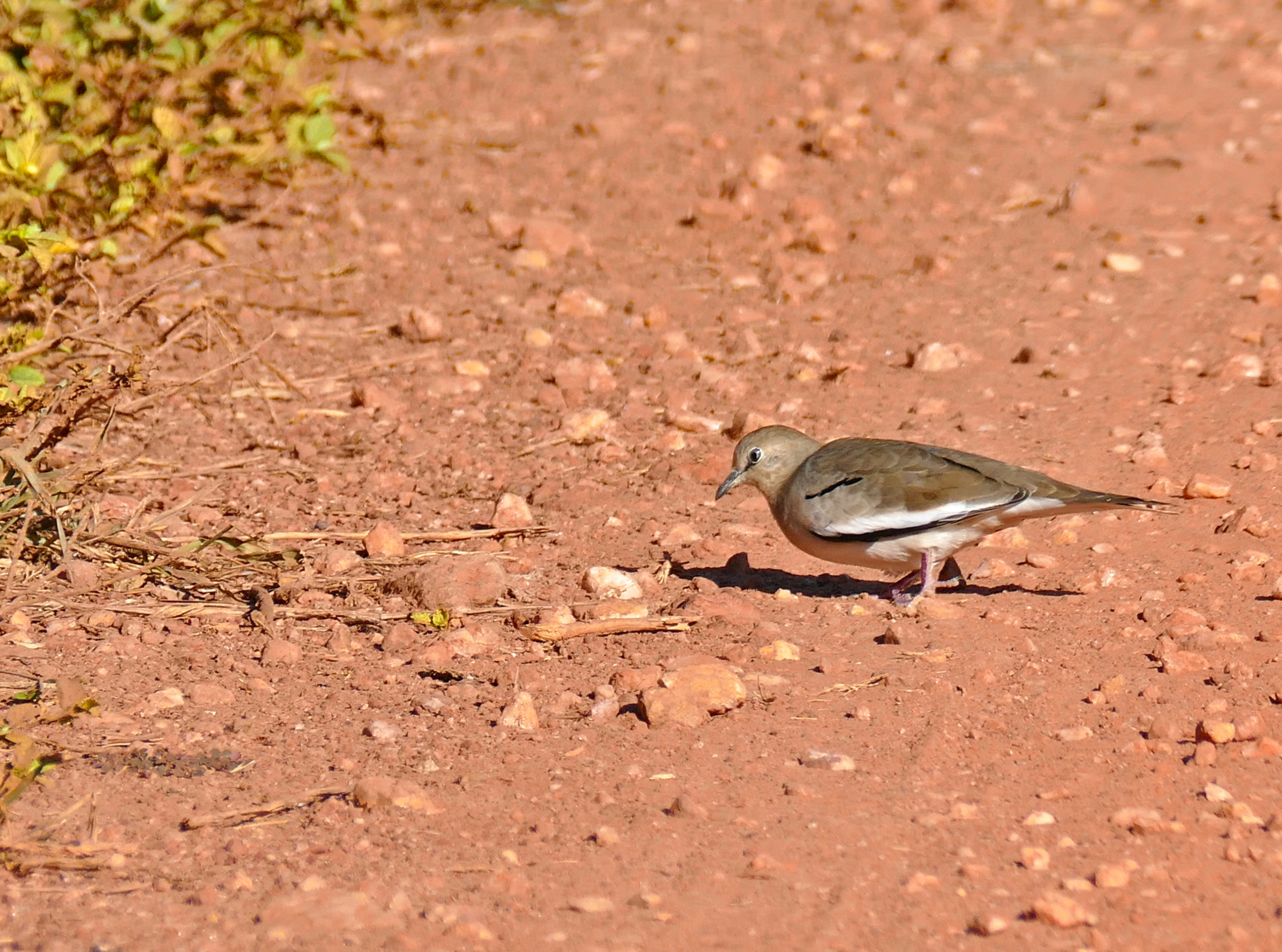 Pouso Alegre, Transpantaneira, Poconé, Mato Grosso, BRAZIL